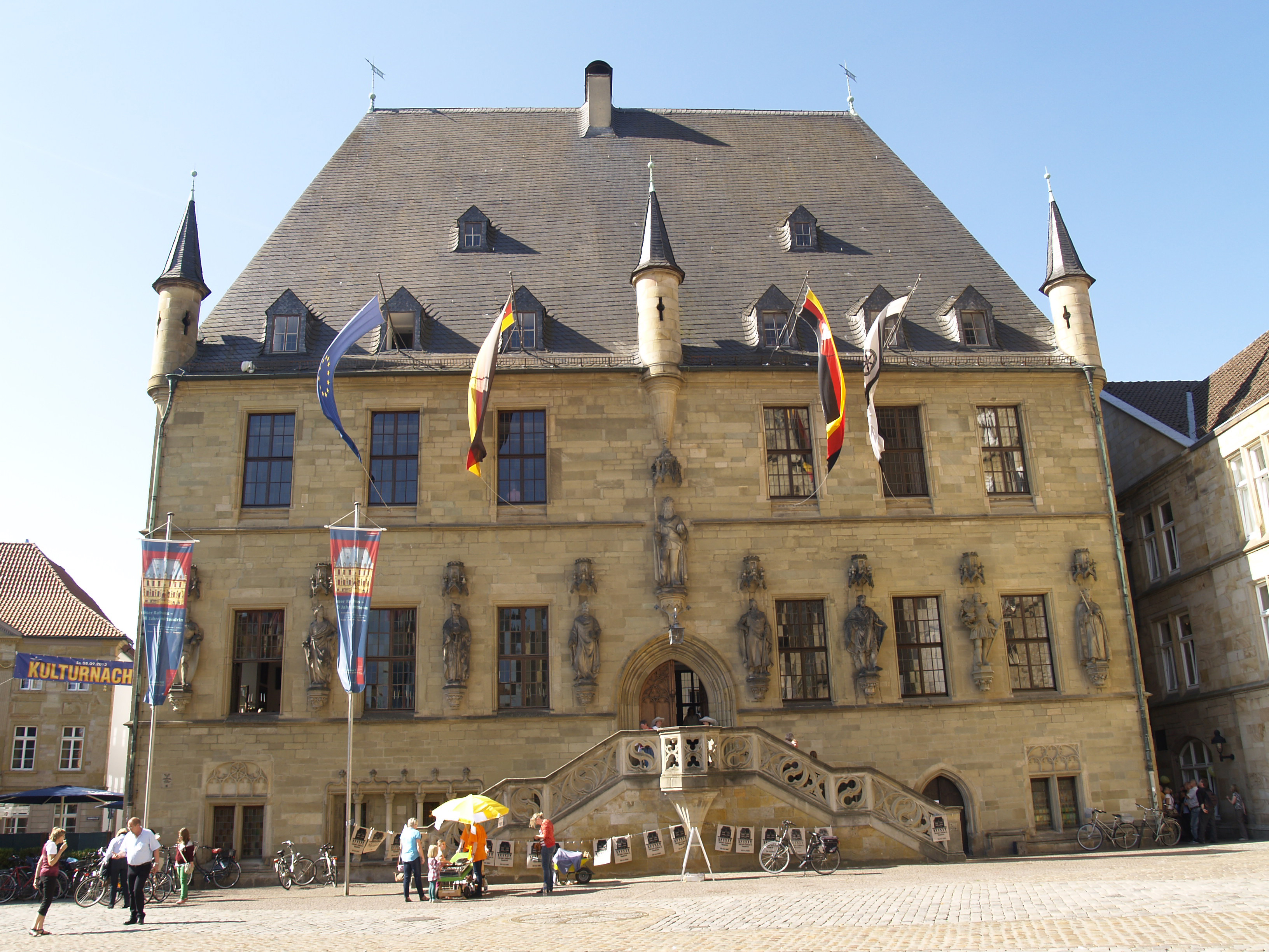 Das Rathaus von Osnabrück wird in diesem Jahr 500 Jahre alt nach der Erbauung aus dem Jahre 1512. Hier in Osnabrück wurde der westfälische Frieden aus dem 30 jährigen Krieg 1648 im Friedenssaal geschlossen.